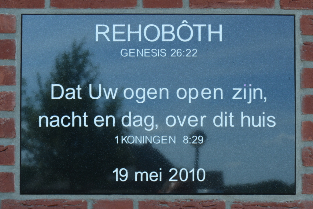 Elspeet, Hesteld Herfoarme Tsjerke, gevelstien